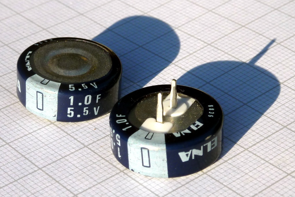 Detailansicht der Polaritätskennzeichnung von Doppelschichtkondensatoren